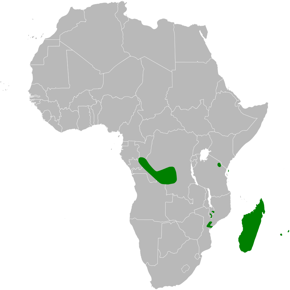 Phedina distribution map